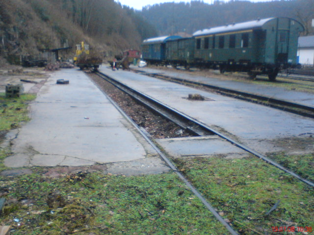 Fundament des großen Lokschuppens mit halbzugeschütteten Arbeitsgruben im Bw Calw